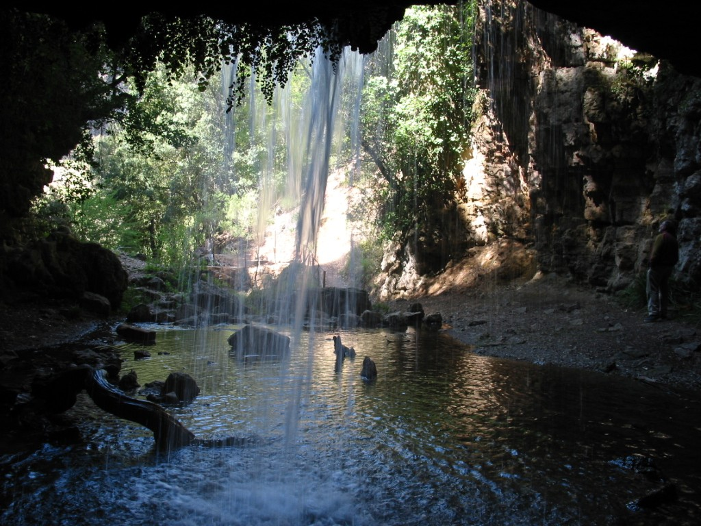 Su Stampu 'e su Turrunu